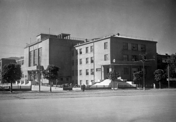 Галоўны корпус БДУ. Від з боку Дома ўрада, 1930-я гады. (У перабудаваным выглядзе гэты будынак сёння знаходзіцца "ўнутры" педагагічнага ўніверсітэта)